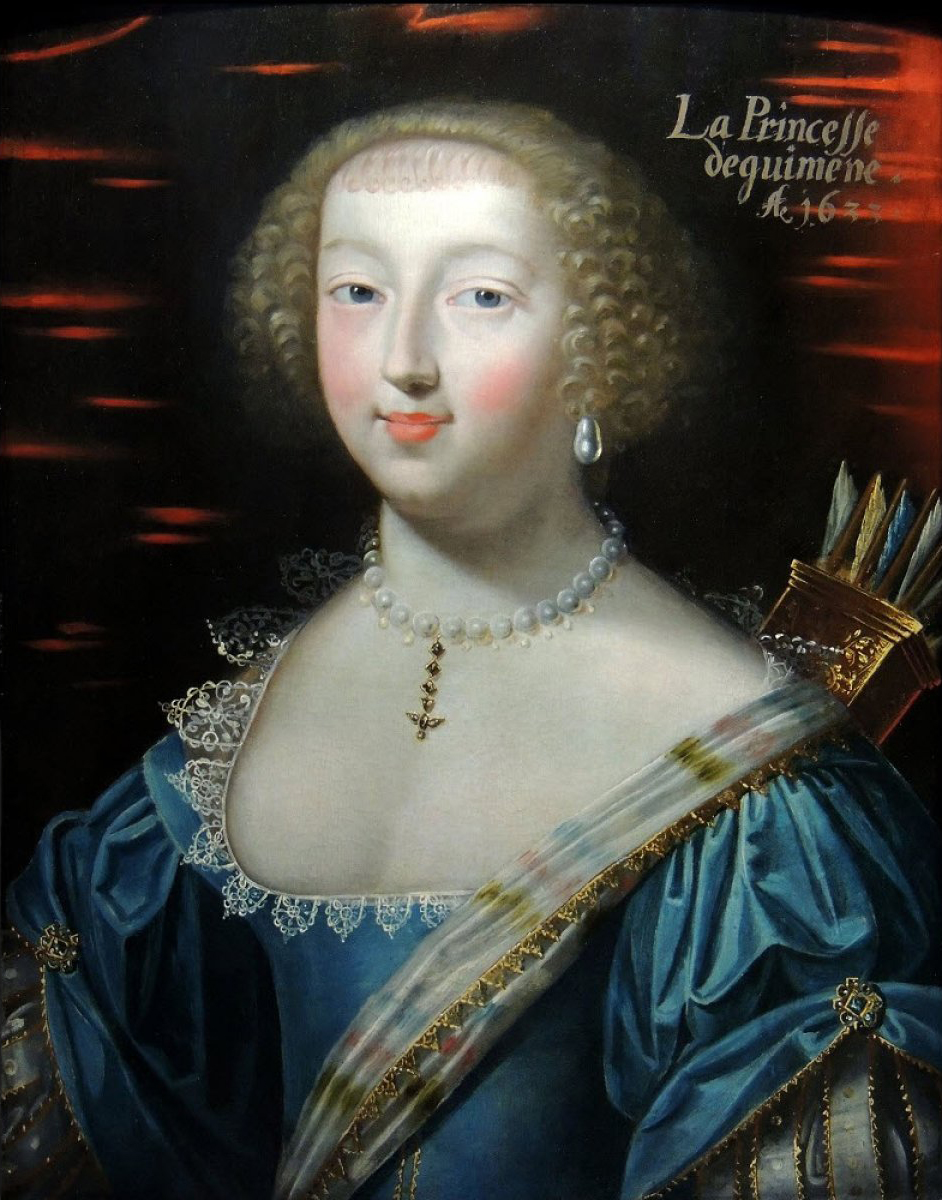 description